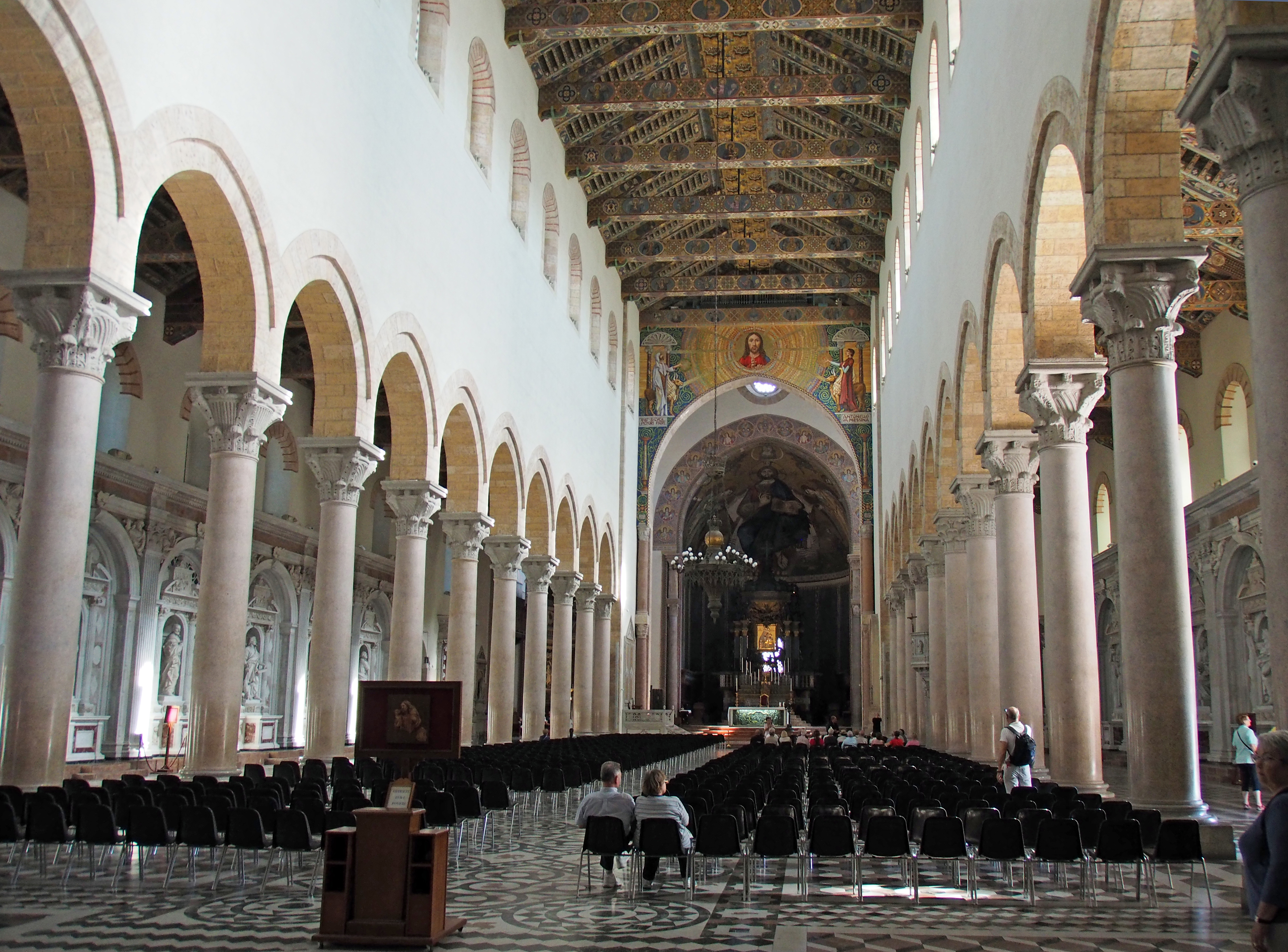 Mittelschiff der Kathedrale von Messina